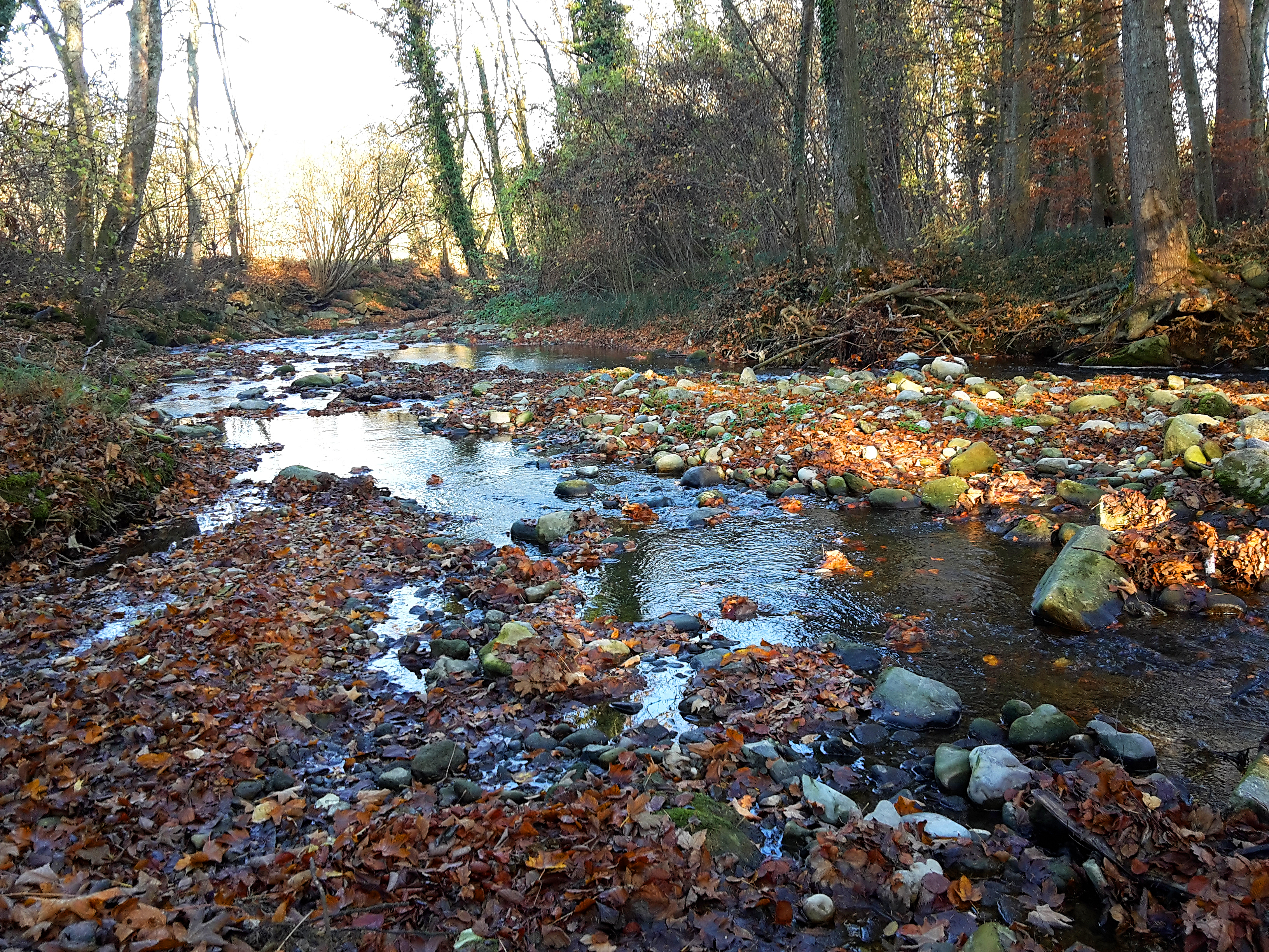 Reppisch mit Dönibach Mündung (links)